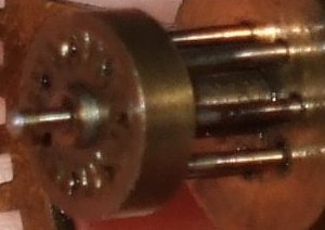 Hohltrieb eines Uhrwerkes